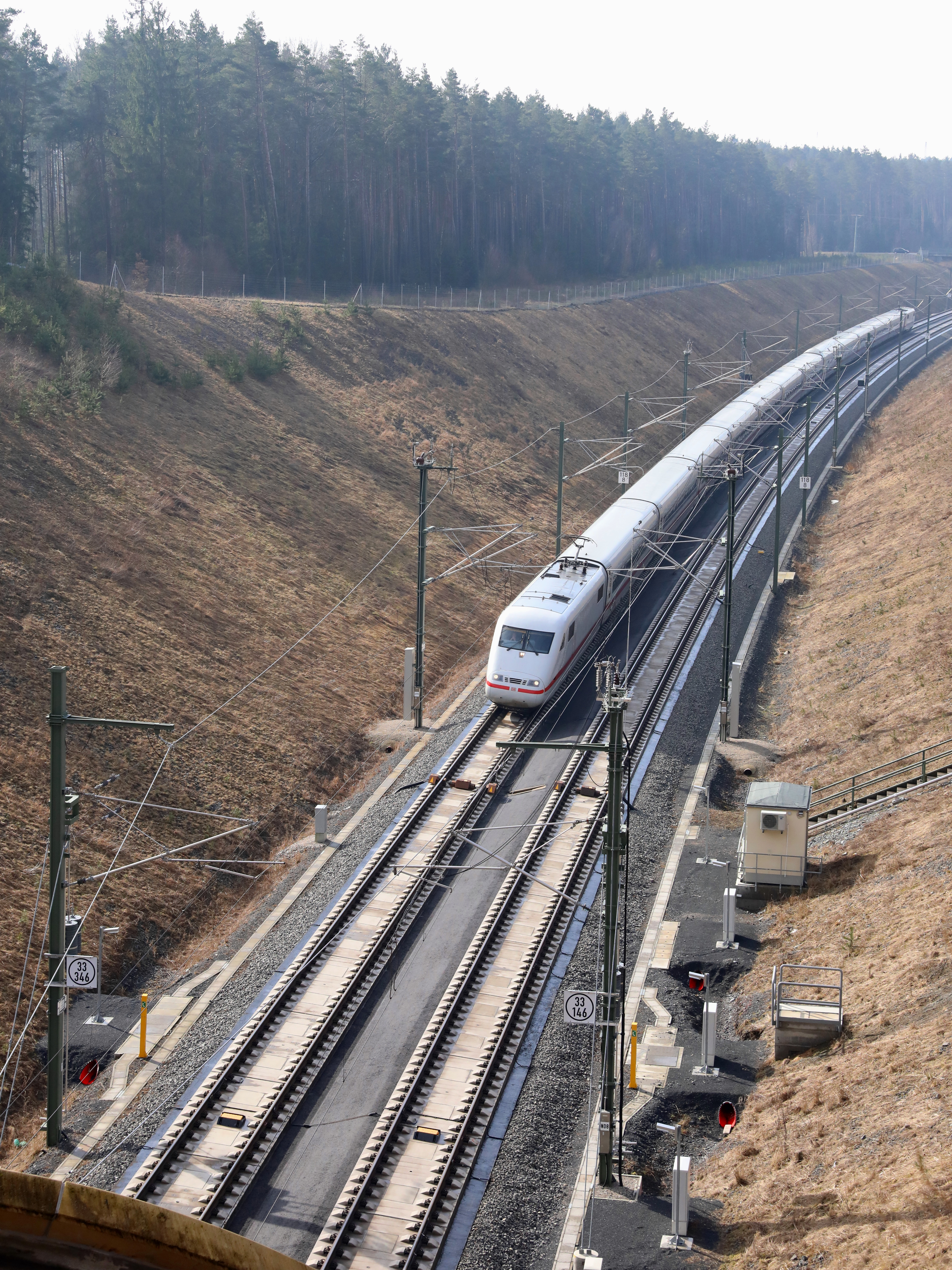 Südportal Tunnel Müß